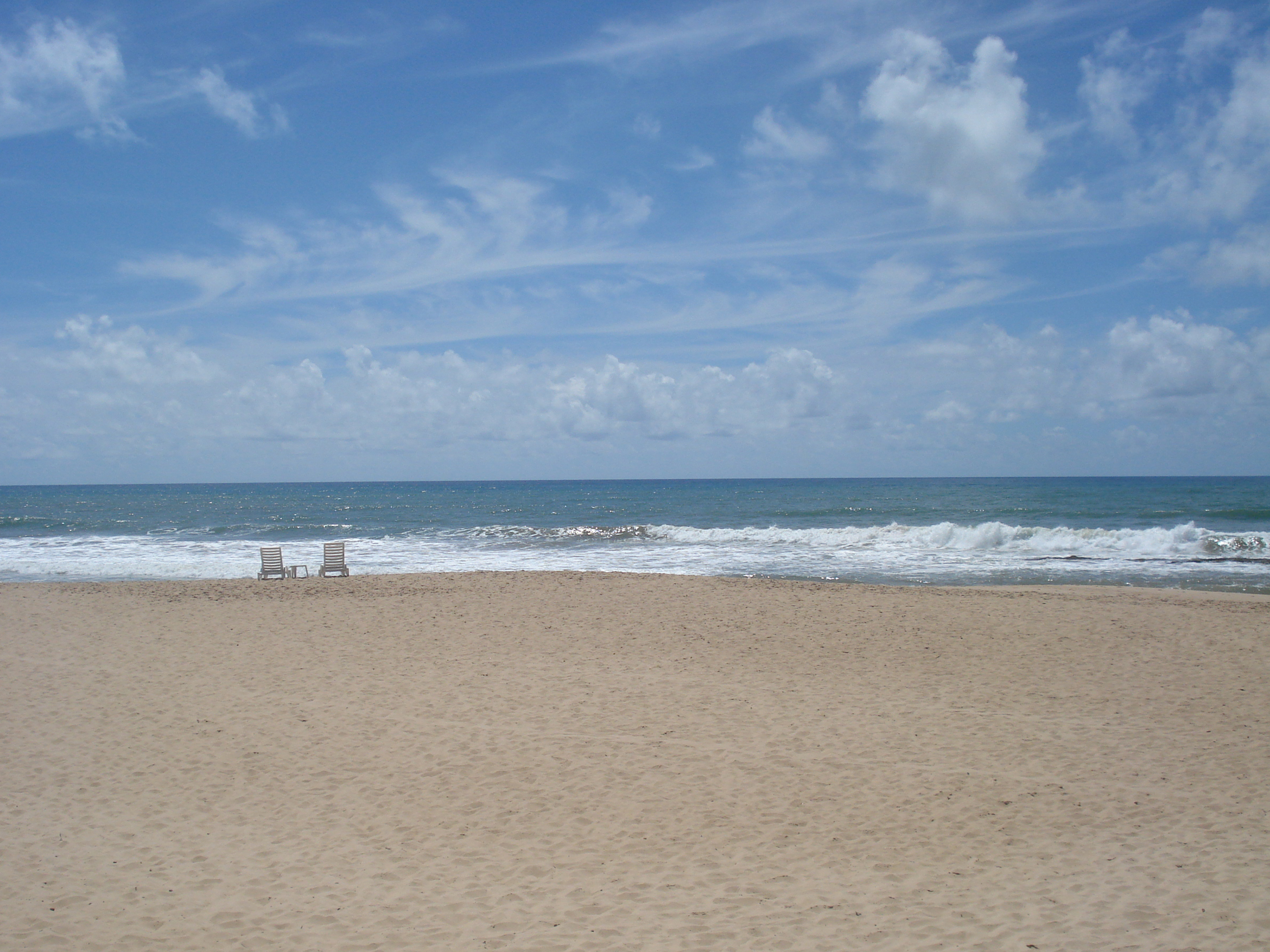 Playa en Costa do Sauípe, Bahía, Brasil.